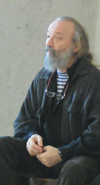 אנטולי וסילייב